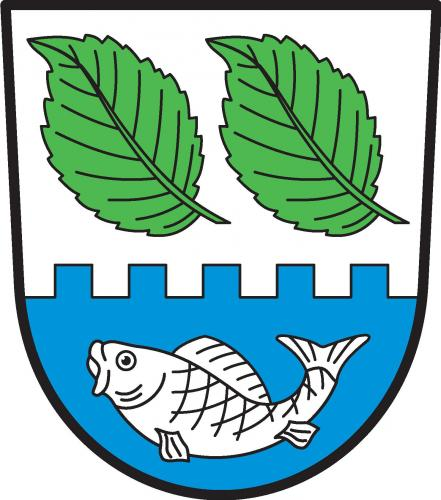 Bříšťany znak